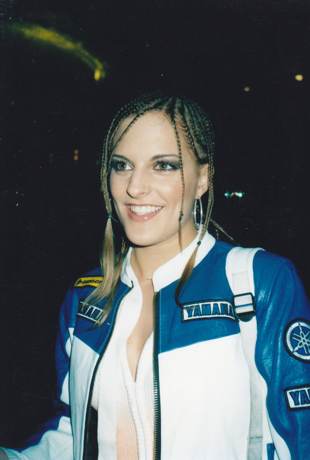 Sandy von den No Angels (2002)